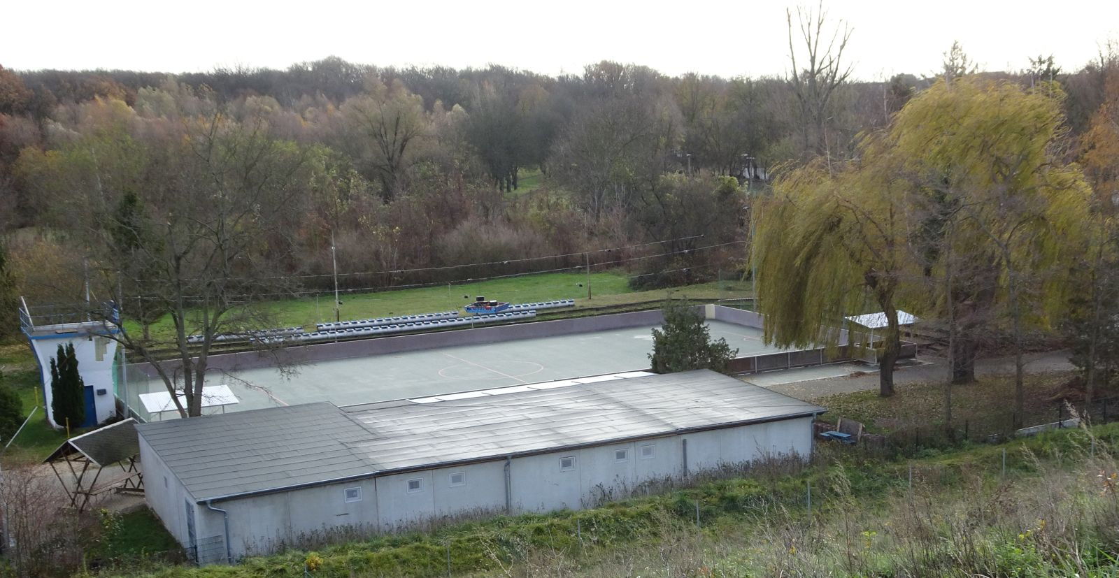 Rollhockeystadion in Böhlitz-Ehrenberg, Blick von der ehem. Deponie